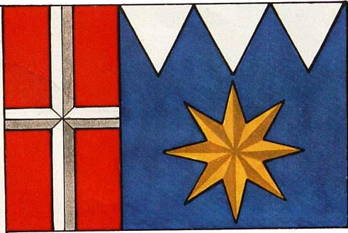 Vlajka obce Mysločovice. List tvoří červený žerďový pruh široký jednu třetinu délky listu s bílým středovým křížem a modré pole se třemi bílými klíny na horním okraji listu s vrcholy v jedné třetině šířky listu; pod prostředním klínem žlutá osmicípá hvězda. Poměr šířky k délce listu je 2 : 3.